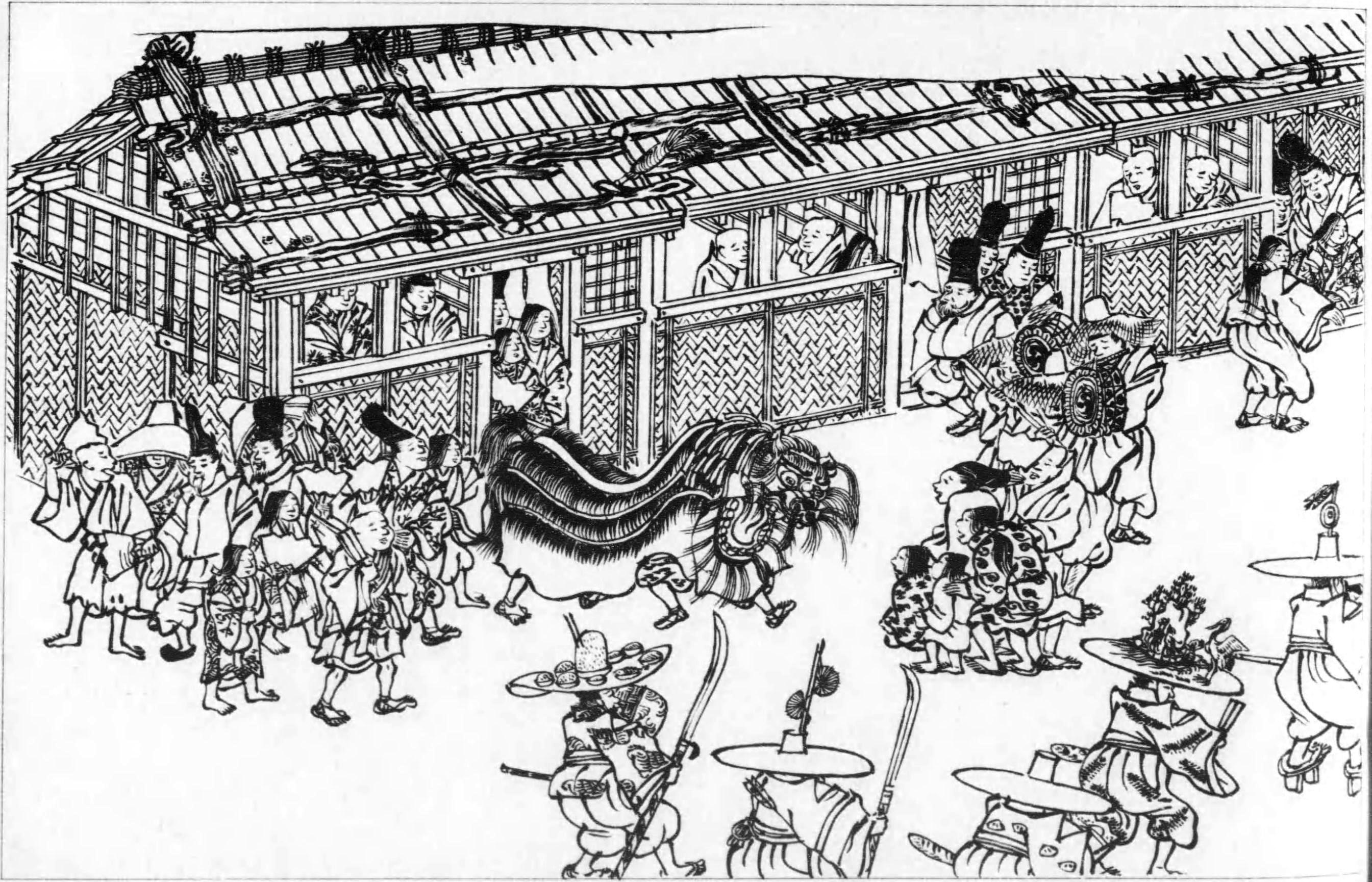 年中行事絵巻に描かれた平安時代末期の町屋。